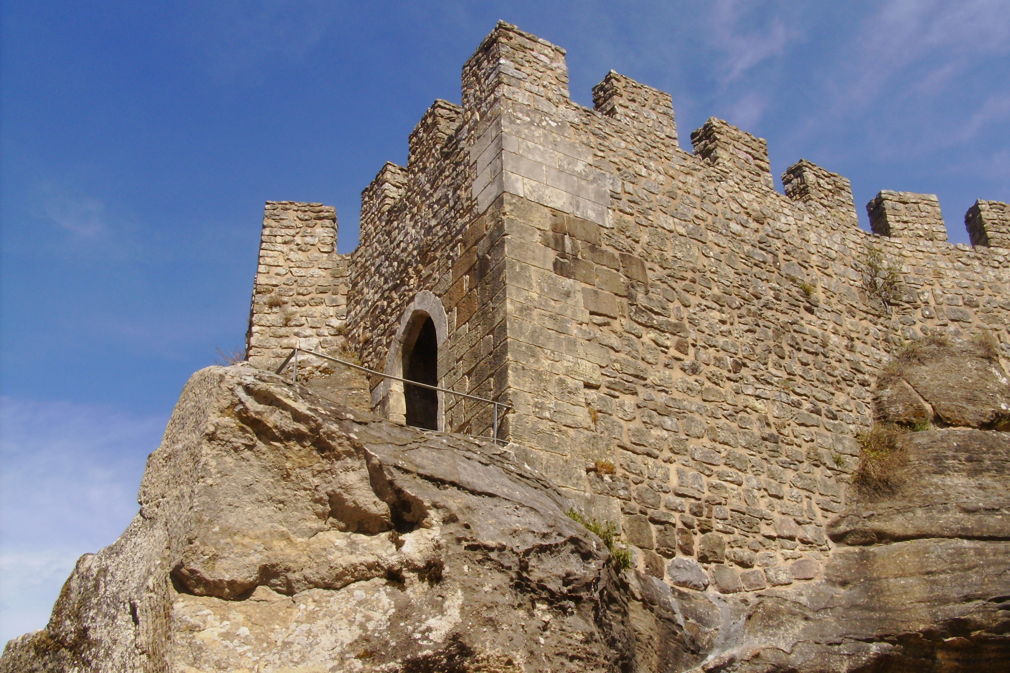 Castelo de Penela, freguesia de Santa Eufémia, concelho de Penela, distrito de Coimbra, Portugal: Castelejo.